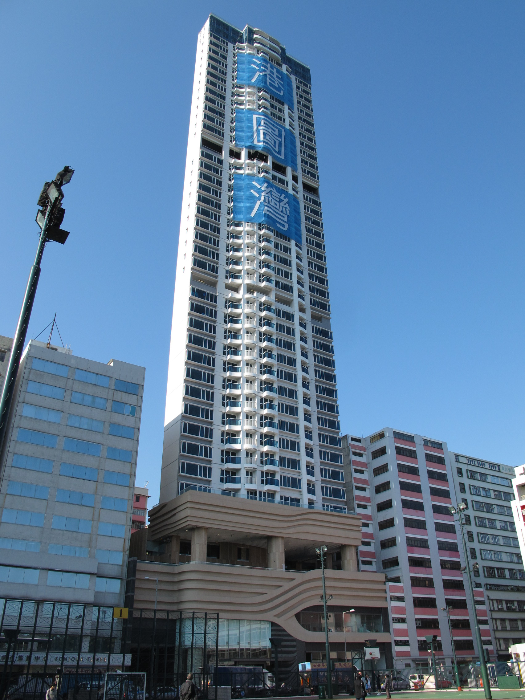 Bayview